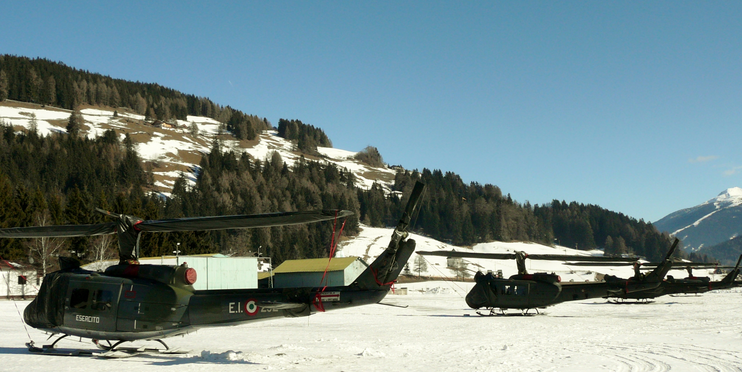 Elicotteri AB-205, presso eliporto di Dobbiaco